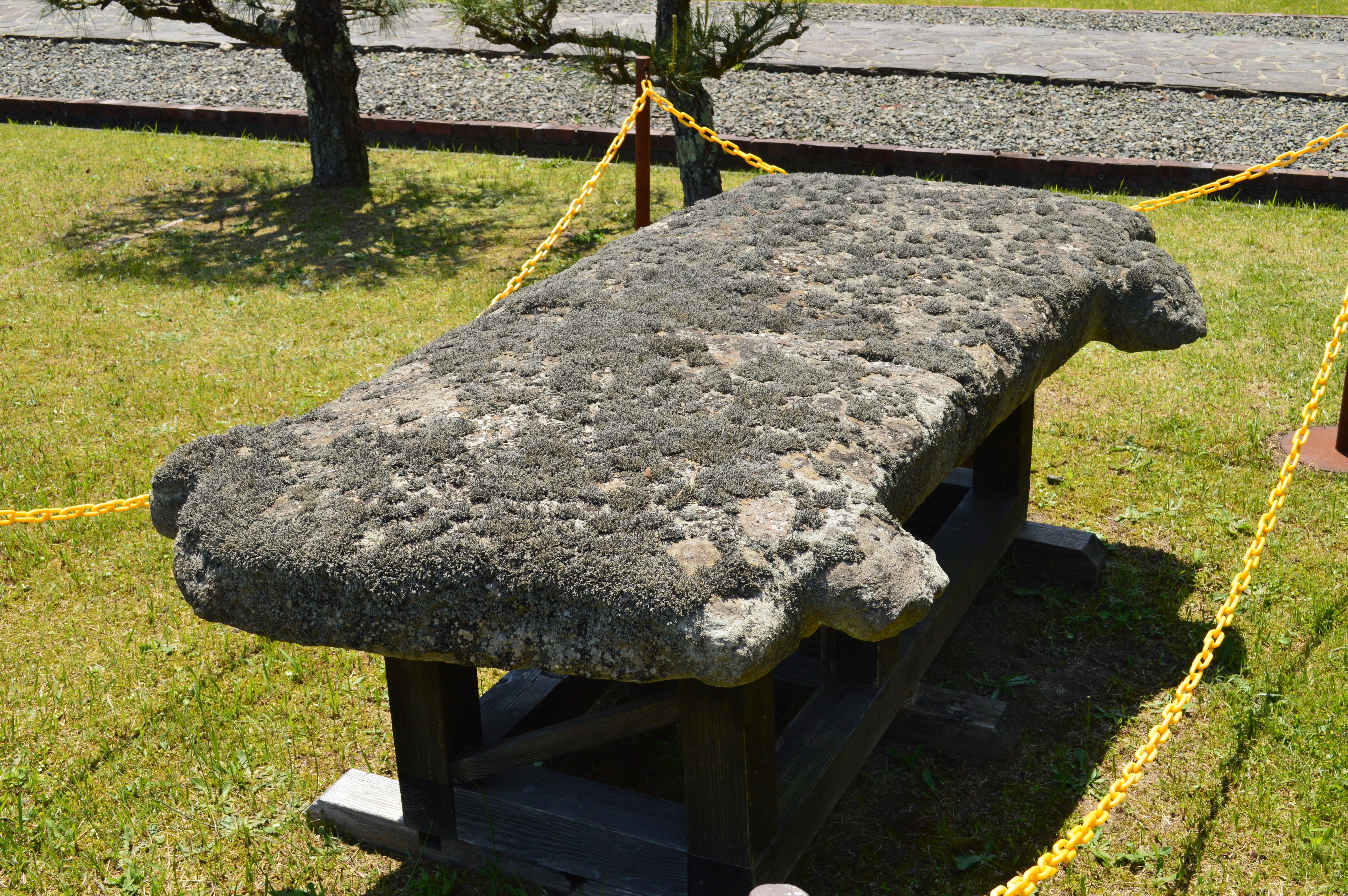 法王寺古墳出土 長持形石棺蓋 (京都府立丹後郷土資料館展示)